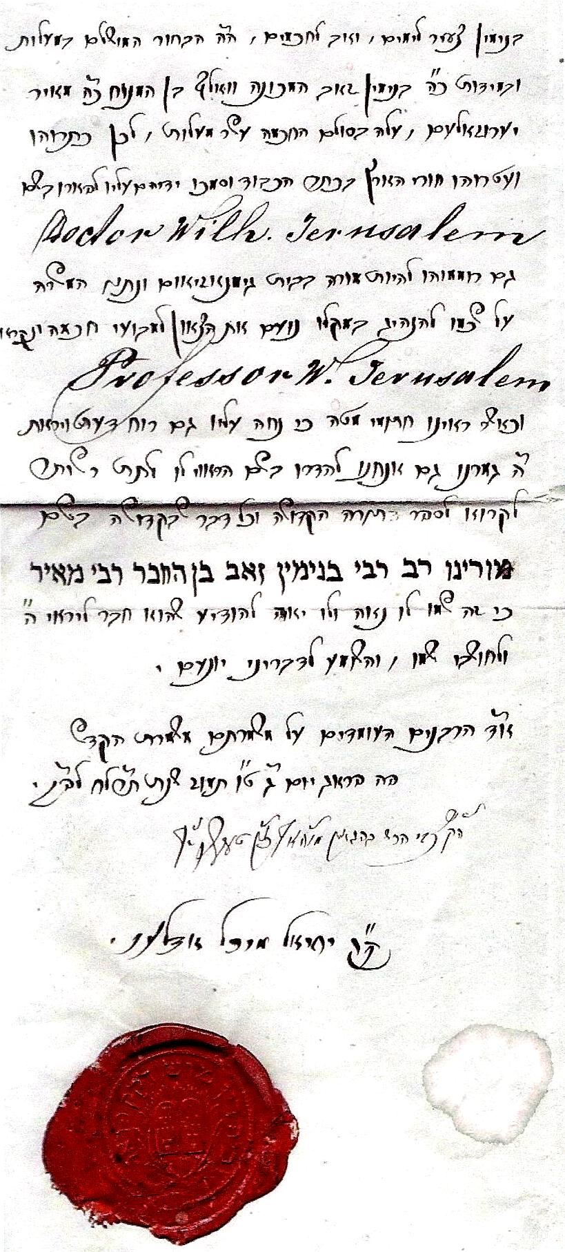 בעת המעבר של ירוזלם מפראג לווינה הוא קיבל את מכתב ההמלצה, בעברית, כדי לקבל עזרה מהקהילה היהודית בווינה